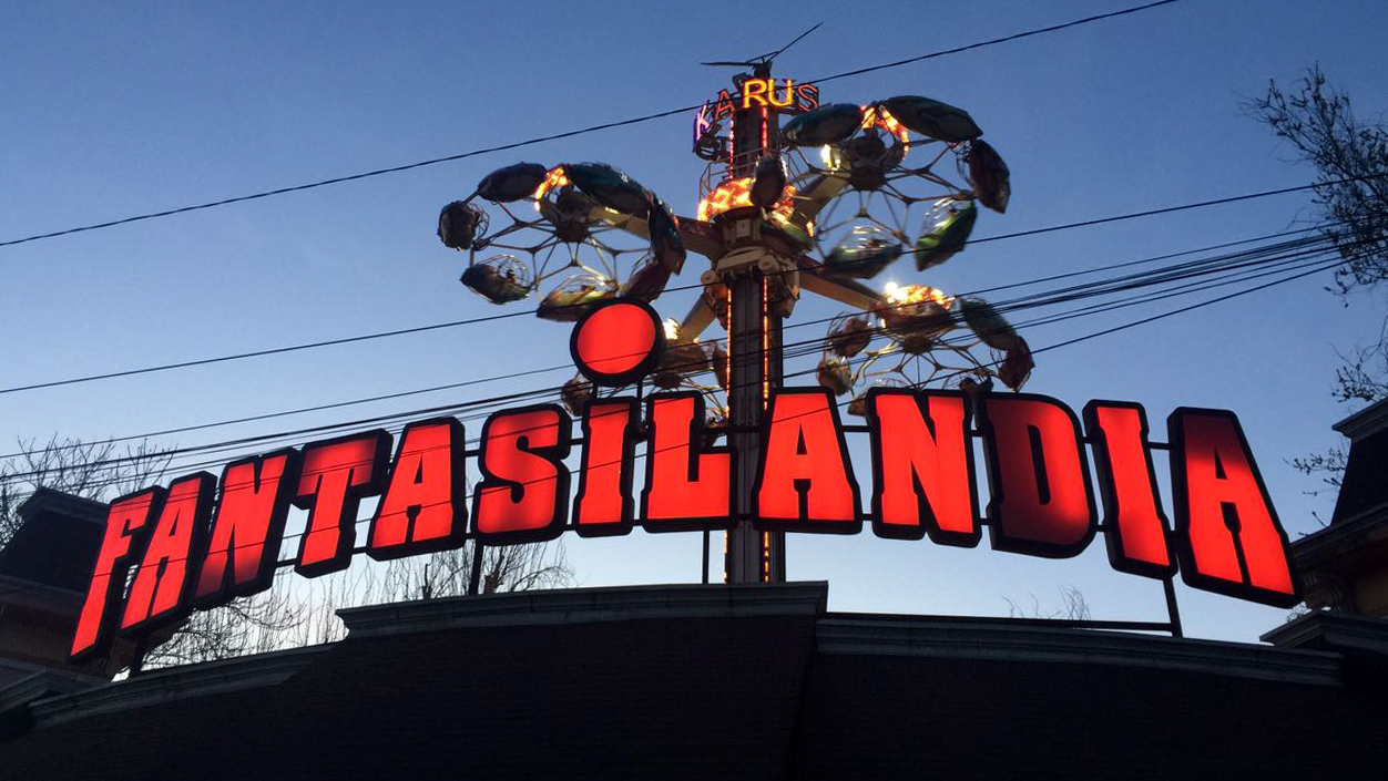 El parque de diversiones Fantasilandia. Parque O'Higgins, Santiago de Chile. 19 de septiembre de 2016.